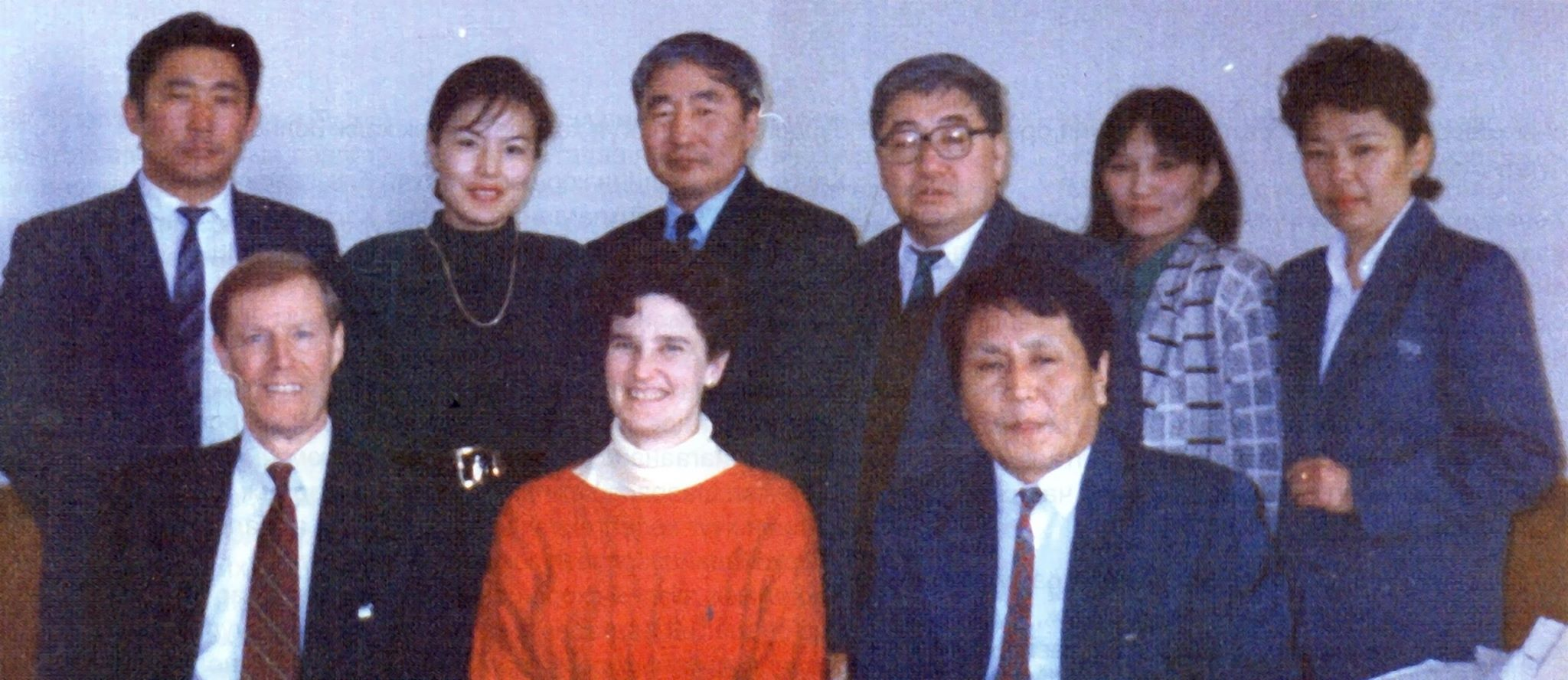 Монгол: Үнэт цаасны хорооны анхны бүрэлдэхүүн АНУ-ын зөвлөх мэргэжилтнүүдийн хамт. 1995 он.